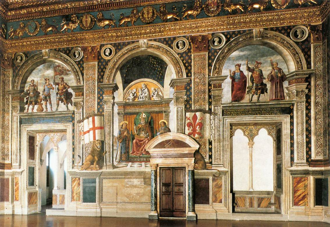 GHIRLANDAIO, Domenico Decoration of the Sala del Gigli Fresco Palazzo Vecchio, Florence